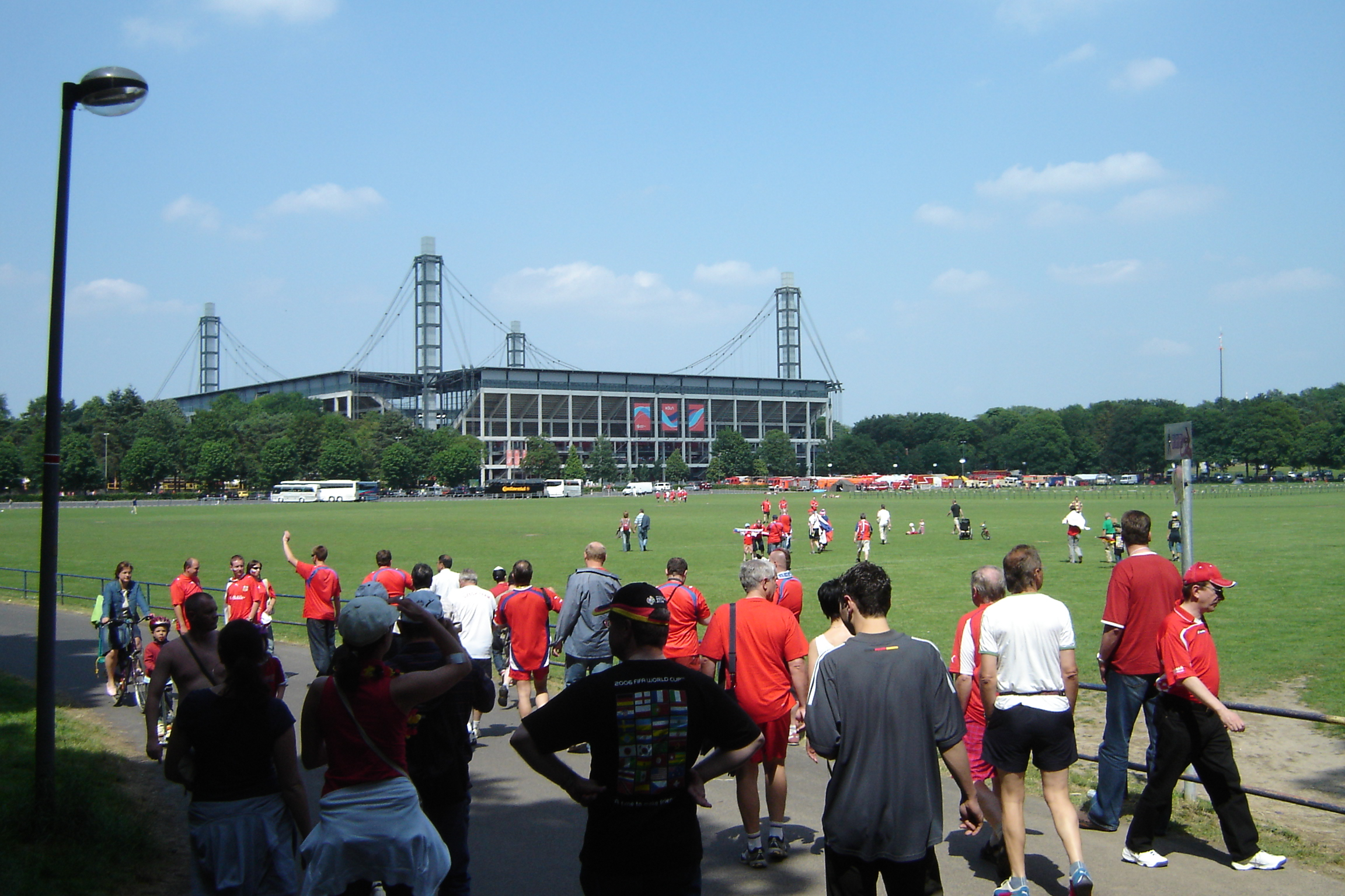 Rhein Energie Stadion v Kolíně n. Rýnem